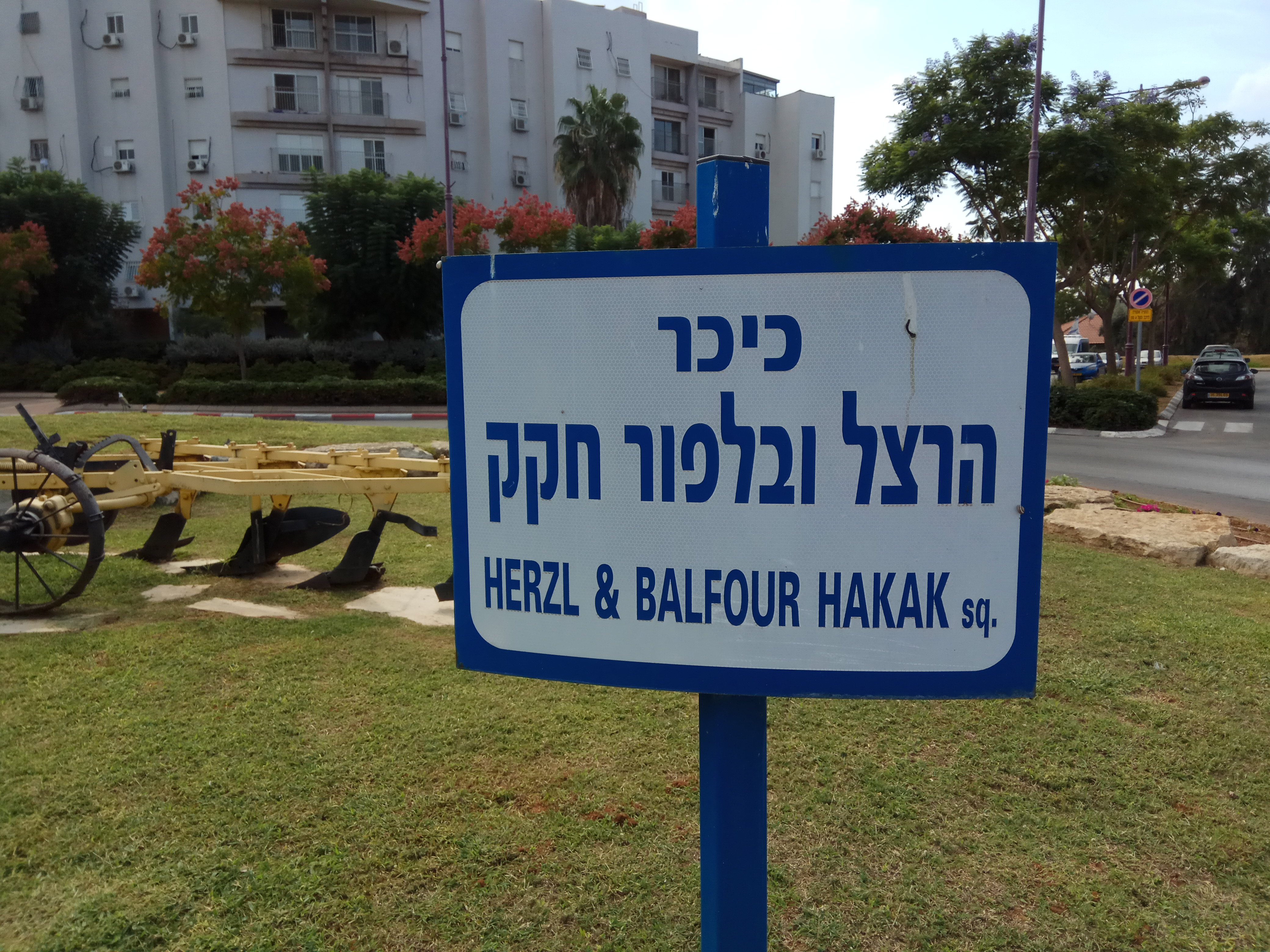 כיכר הרצל ובלפור חקק באור יהודה